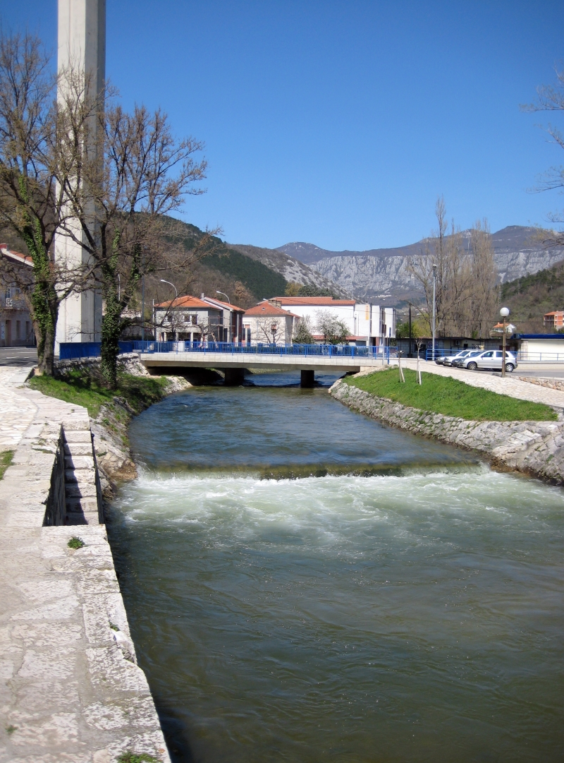 Dubračina, Crikvenica